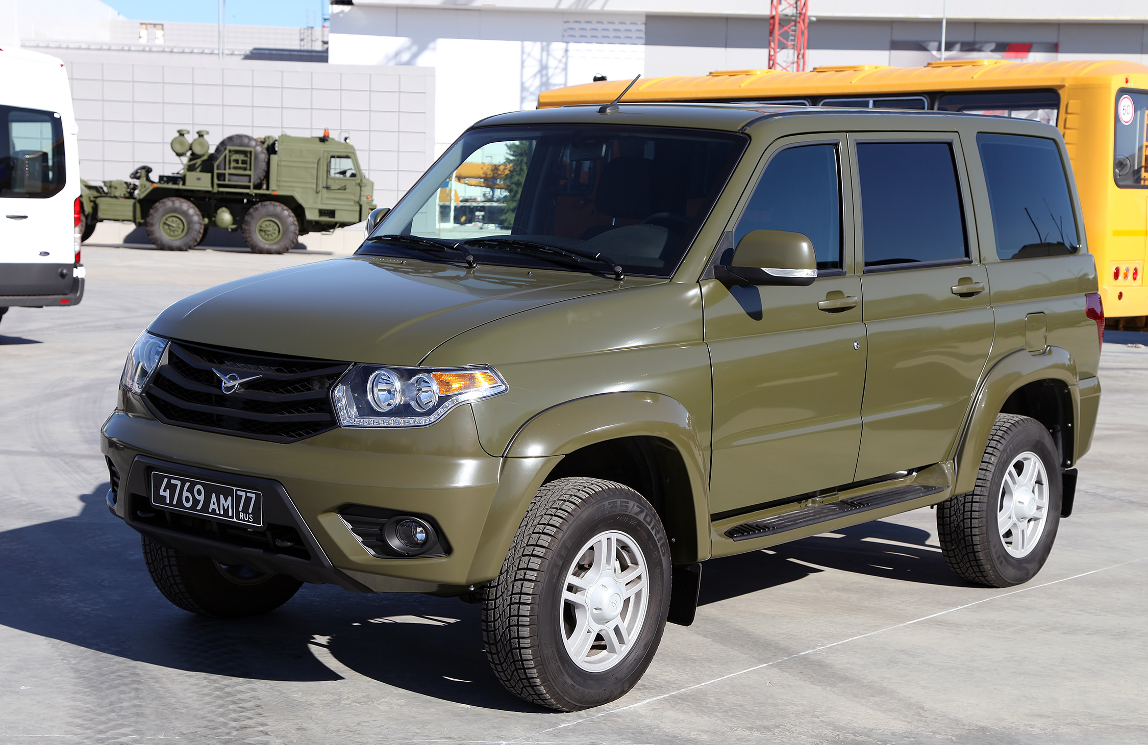 УАЗ-3136 Патриот (UAZ-3136 Patriot)